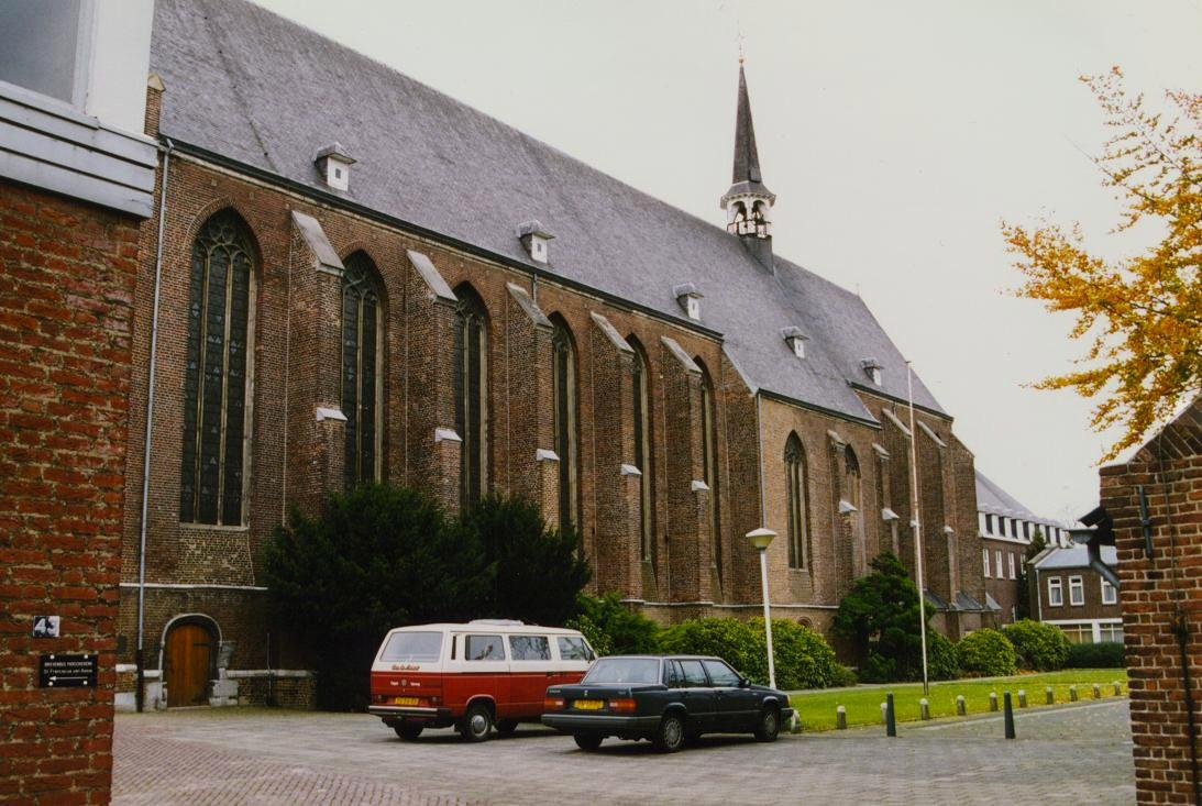 De Franciscanenkerk van het klooster Aldenborch te Weert.